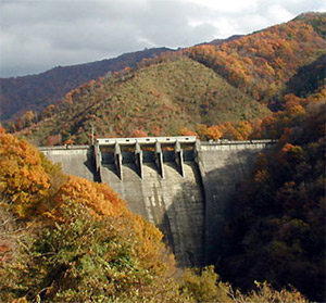 高暮ダムの写真 2001年11月15日 友永秀輝撮影